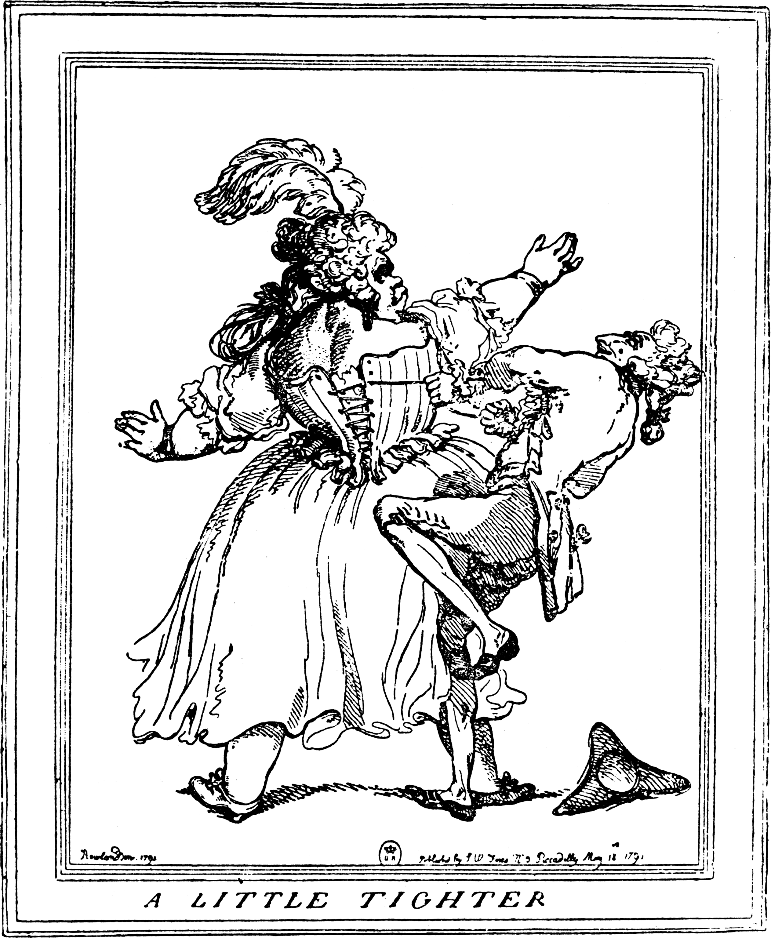 Fig. 88. — Allons, serrez plus ! d'après Rowlandson 1791.